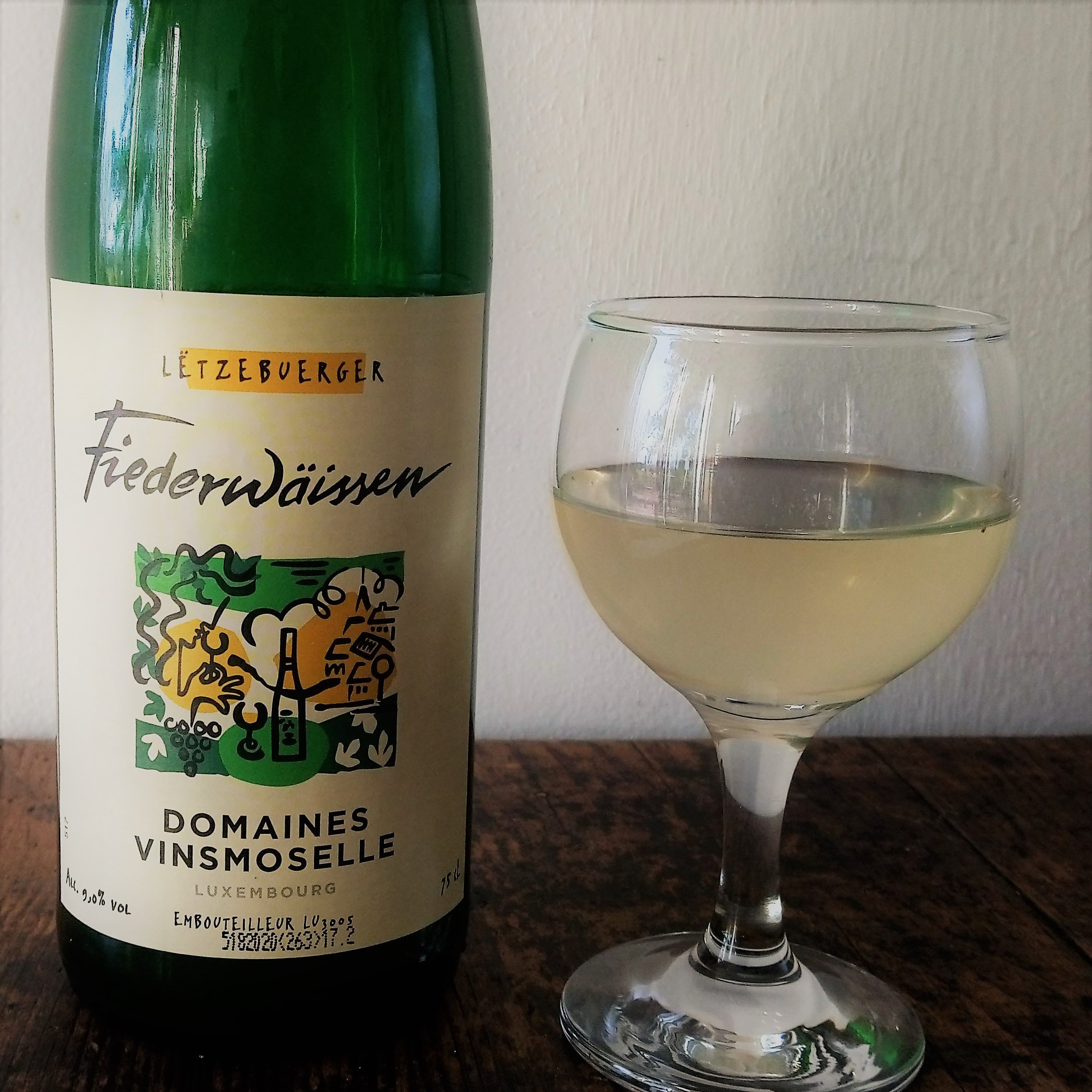 Lëtzebuerger Fiederwäissen (2018) vun "Domaines Vinsmoselle".